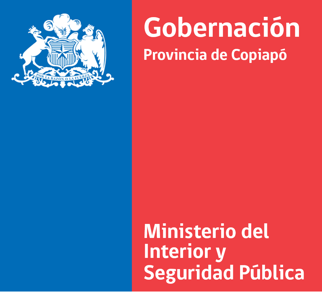 Logotipo de la gobernación provincial de Copiapó, establecido en 2010.